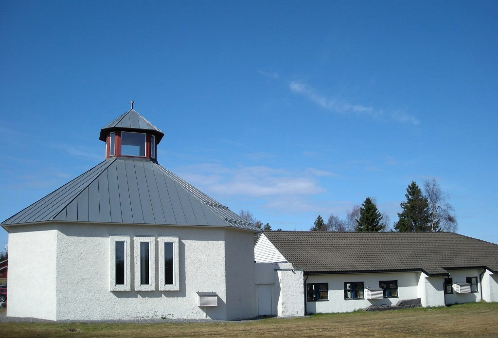 Jessheim kirke (Ullensaker kommune)